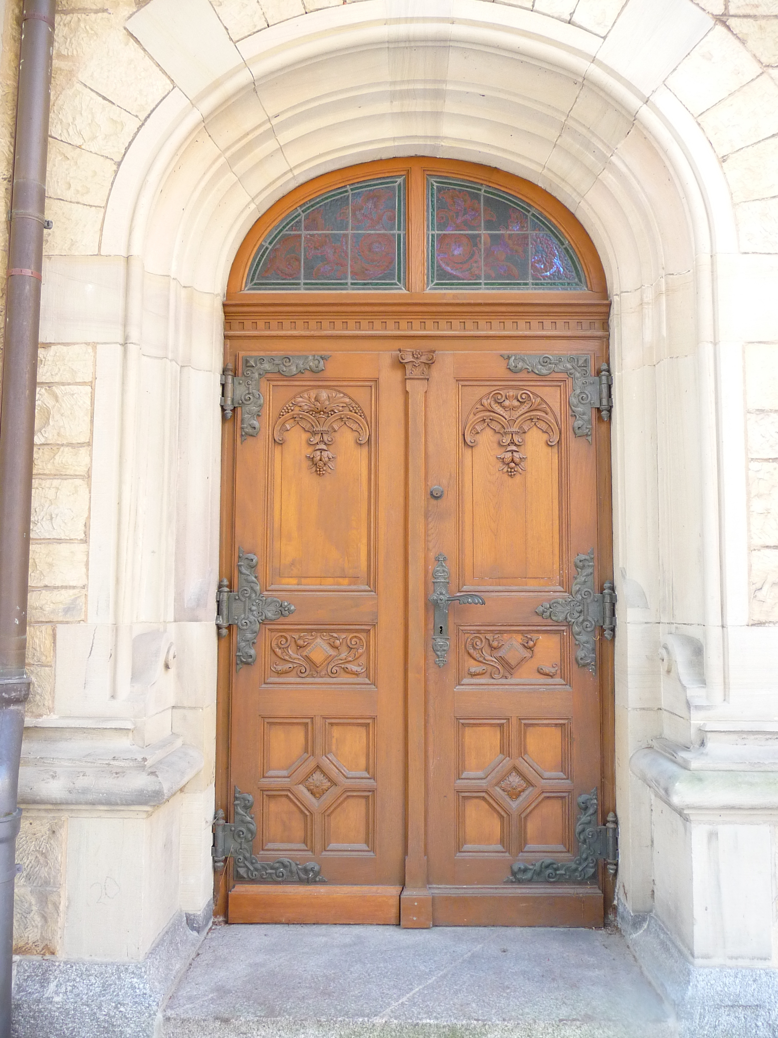 Heidelberg, östliches Seitenportal der Christuskirche (Weststadt)